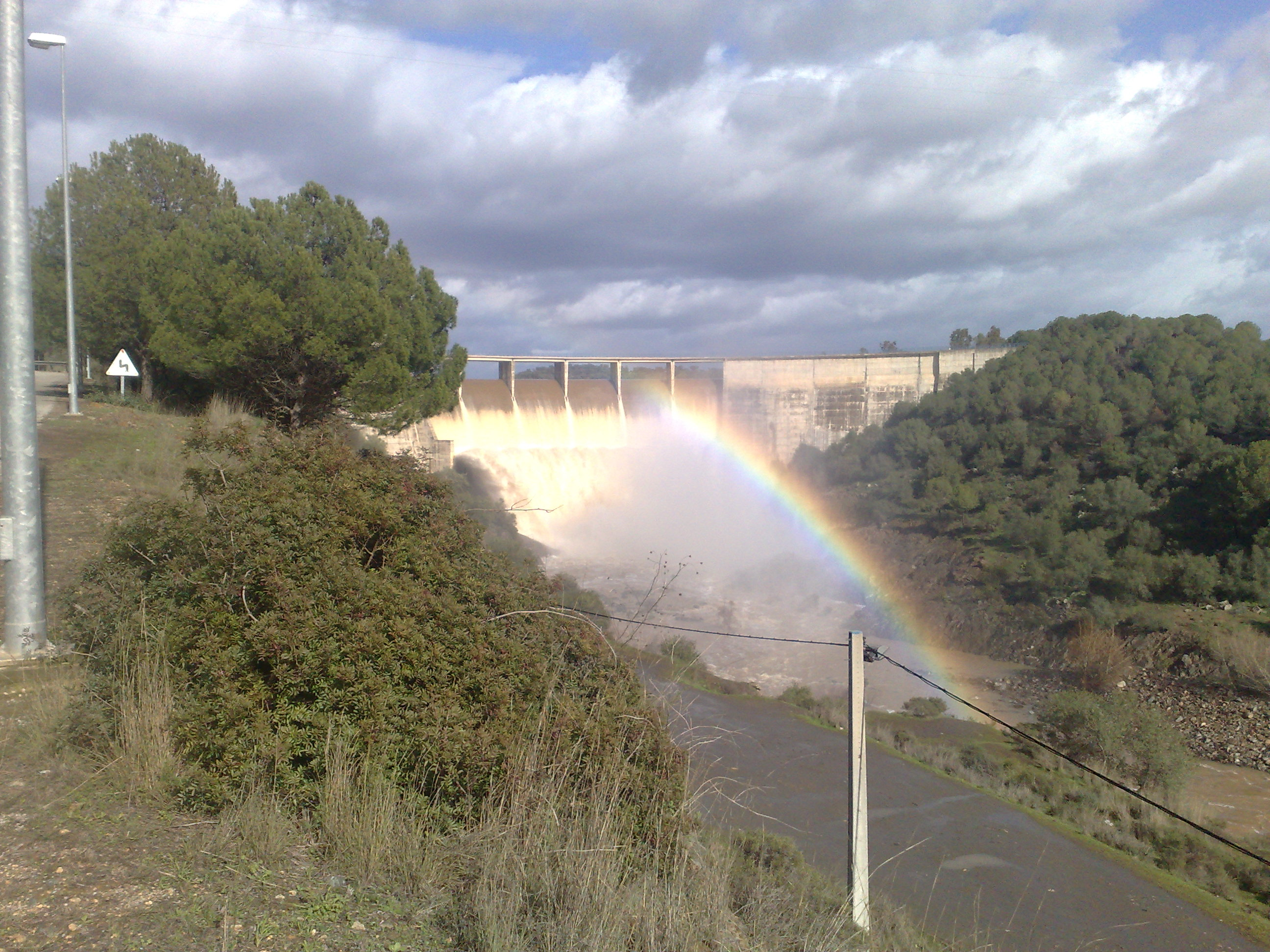 La presa del Gergal (Sevilla) desembalsando agua.